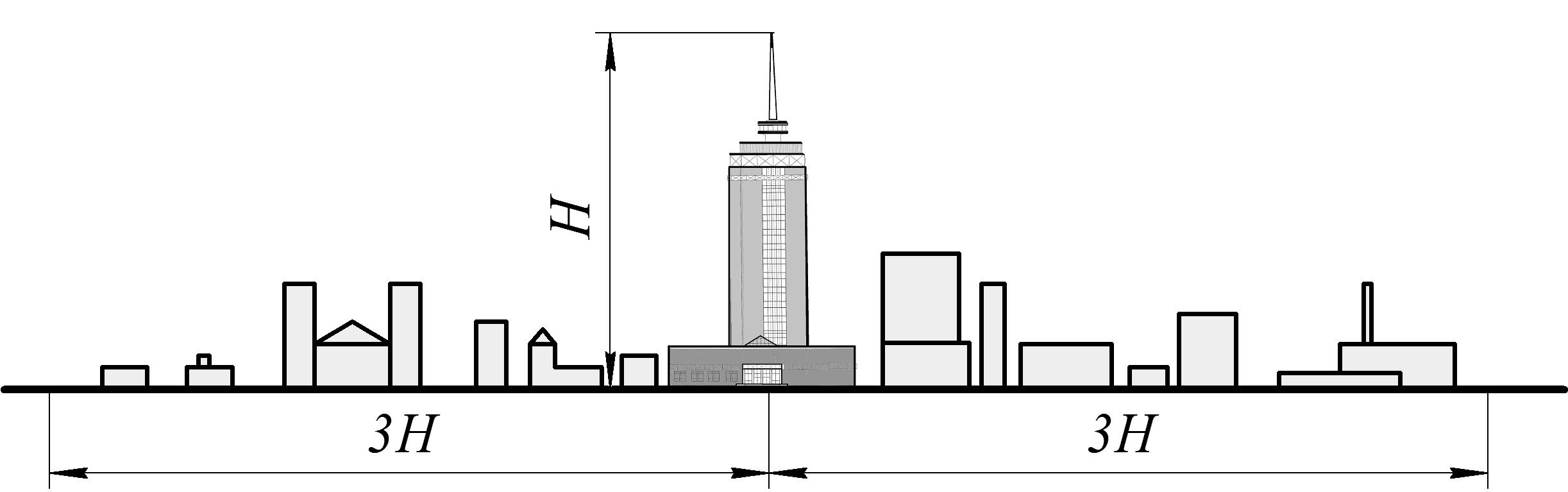 Схематическое изображение условий моделирования высотного здания